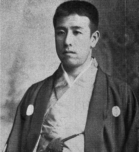 13代辰馬吉左衛門(1868－1943)。辰馬本家酒造当主。白鷹創業者・辰馬悦蔵の長男